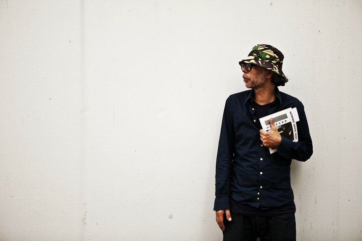 Jaybo Porträt